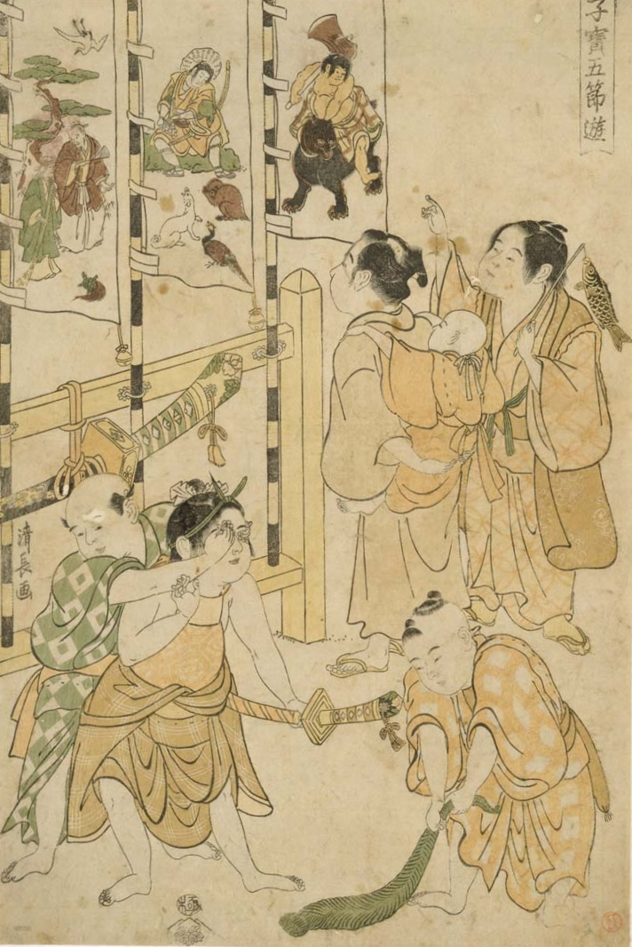 中文（香港）: 子宝五節遊 端午